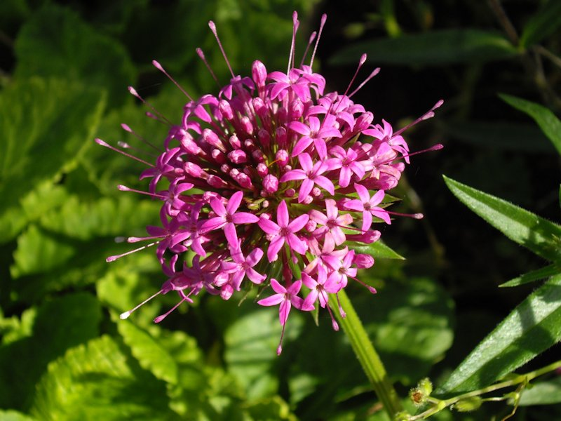 Phuopsis stylosa